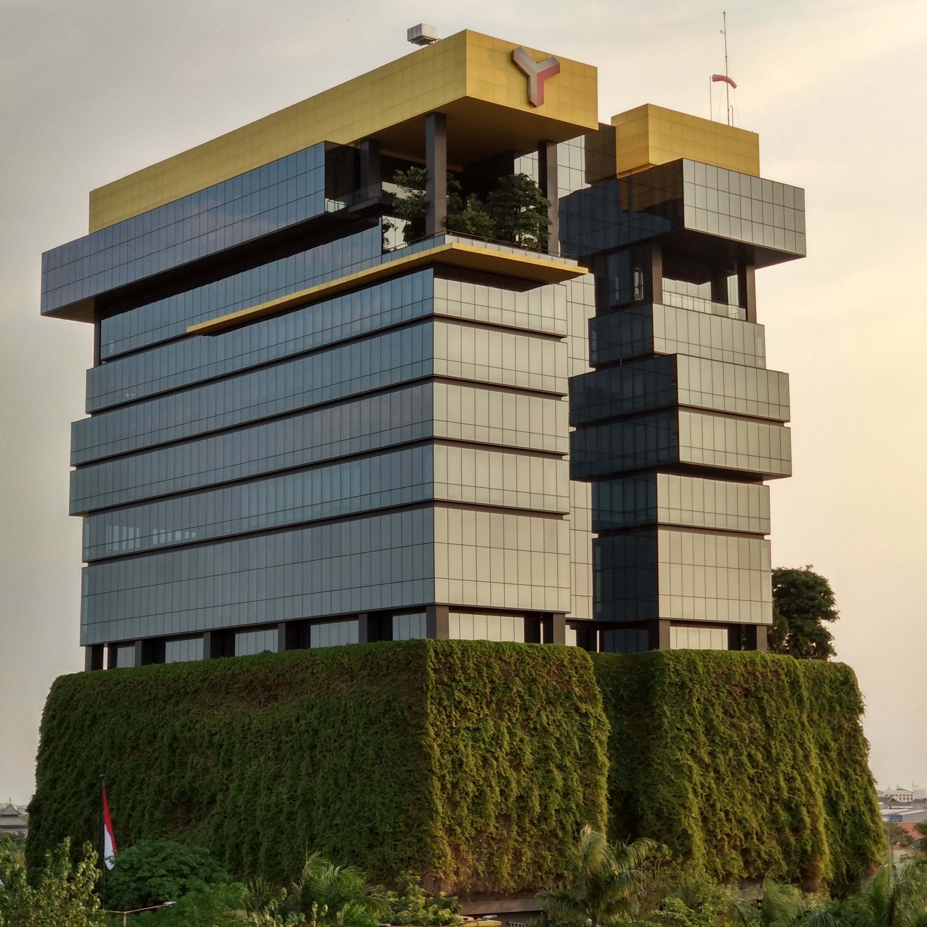 ESA Sampoerna Center, Surabaya (2018-08-18)